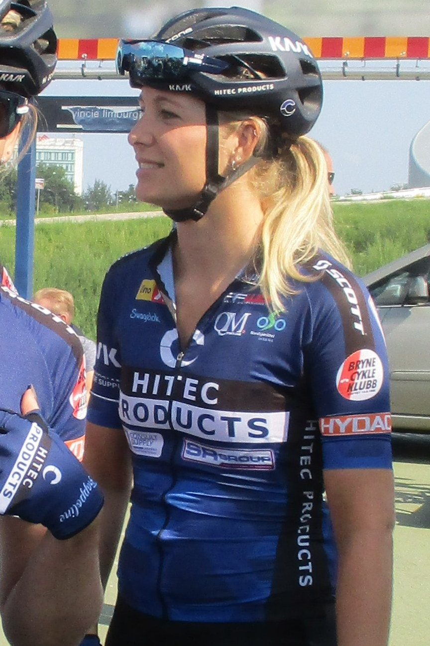 Start van de 6e etappe van de Boels Ladies Tour 2017 op het Tom Dumoulin Bike Park in Sittard-Geleen.